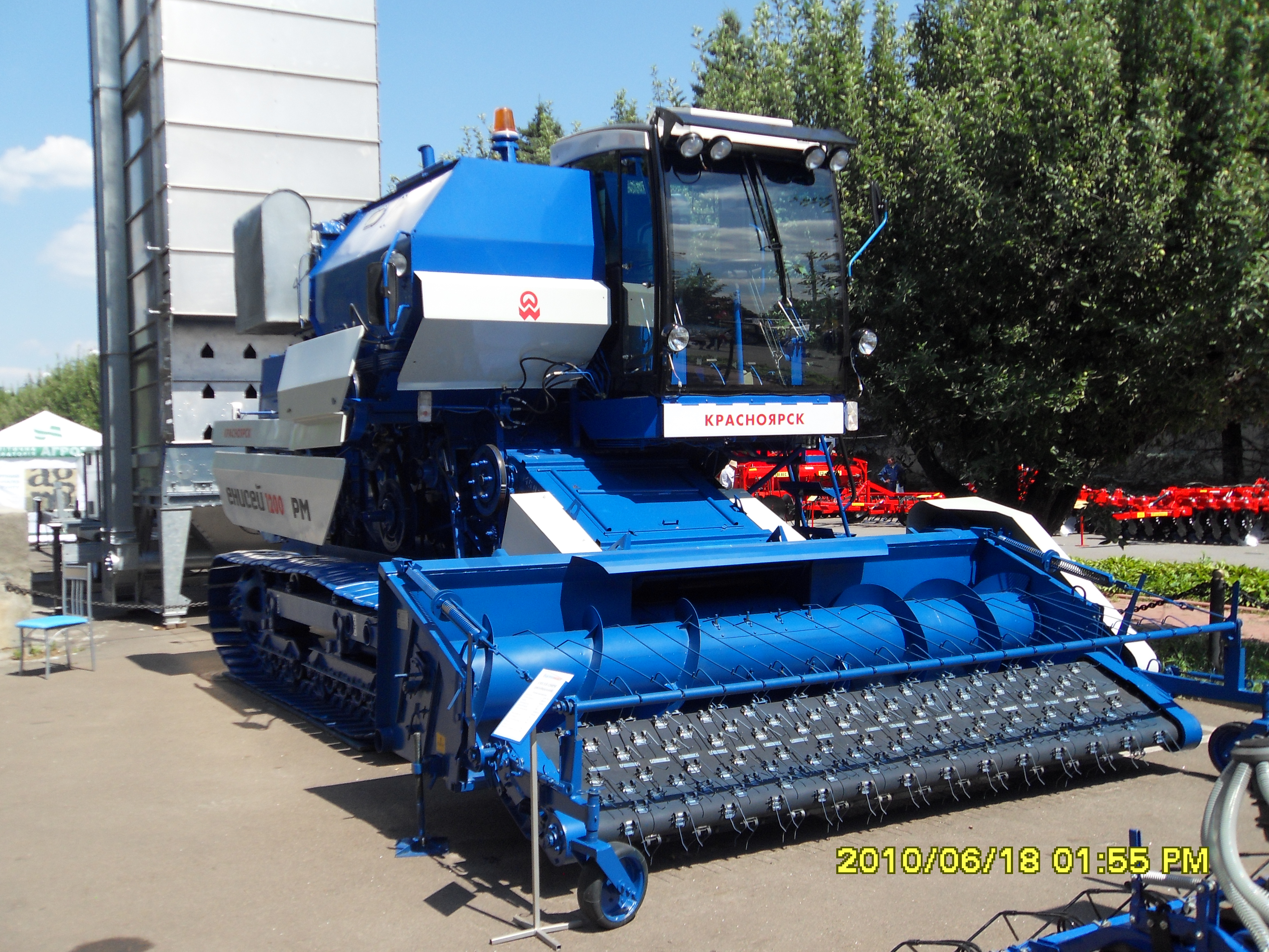 Комбайн для збирання рису